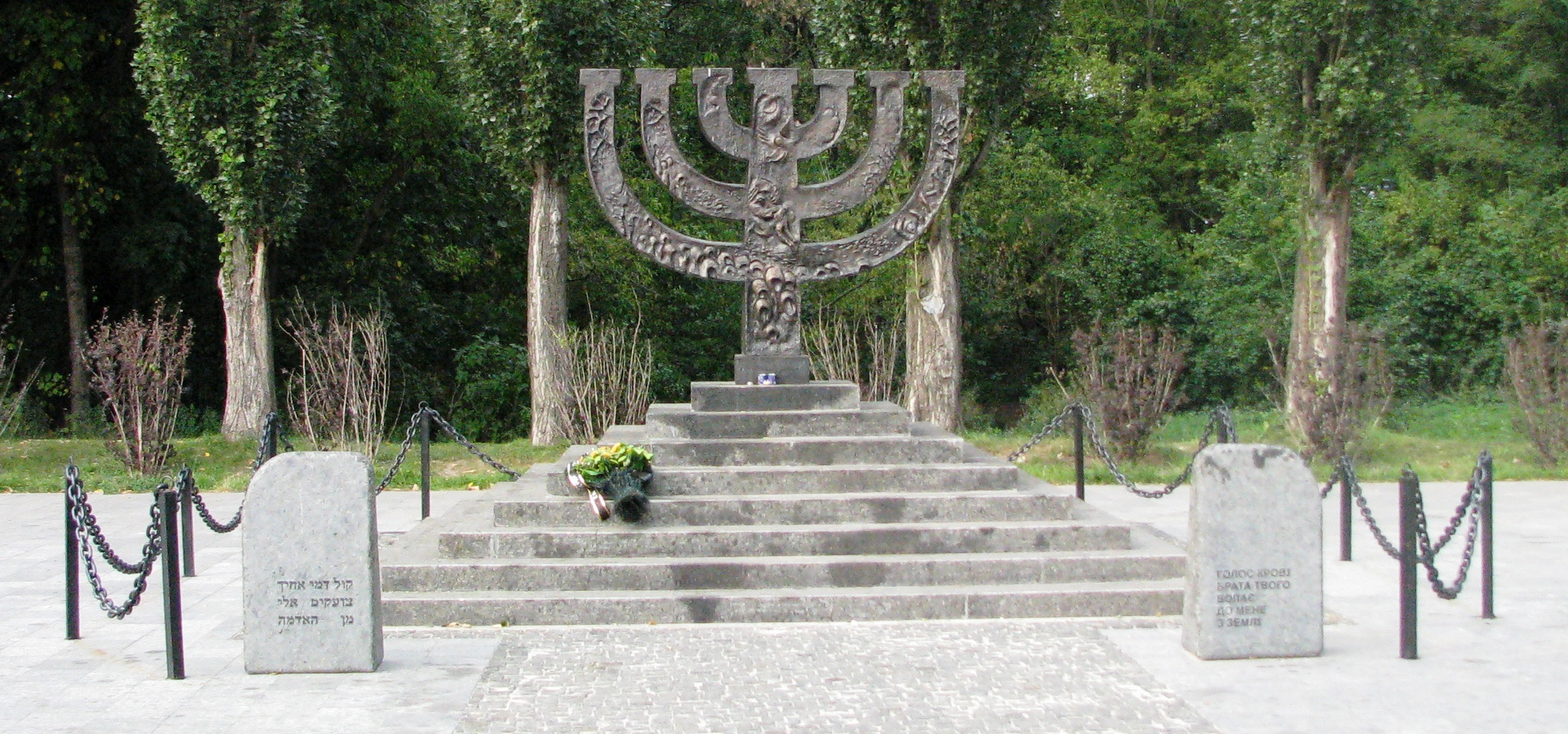 Памятник "Менора". Киев, Бабий Яр